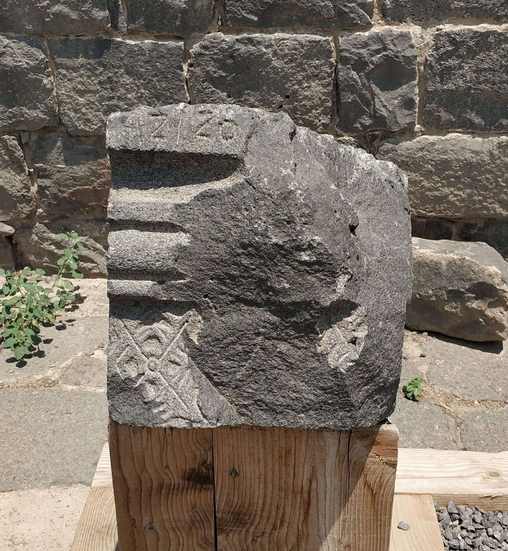 אבן עם הכיתוב AZIZO בבית הכנסת בדיר עזיז